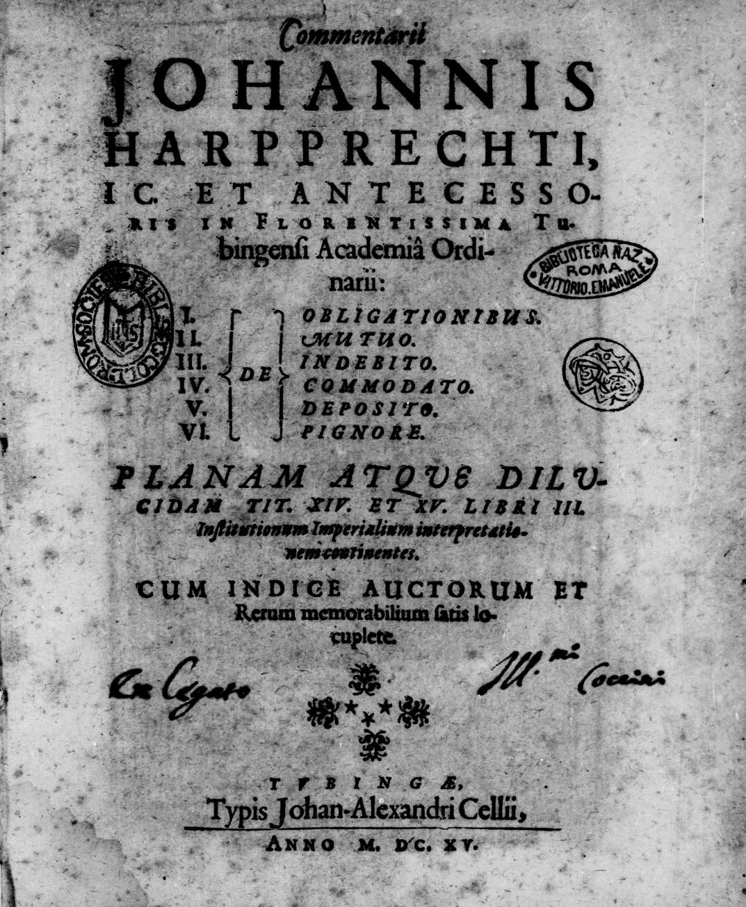 Frontespizio